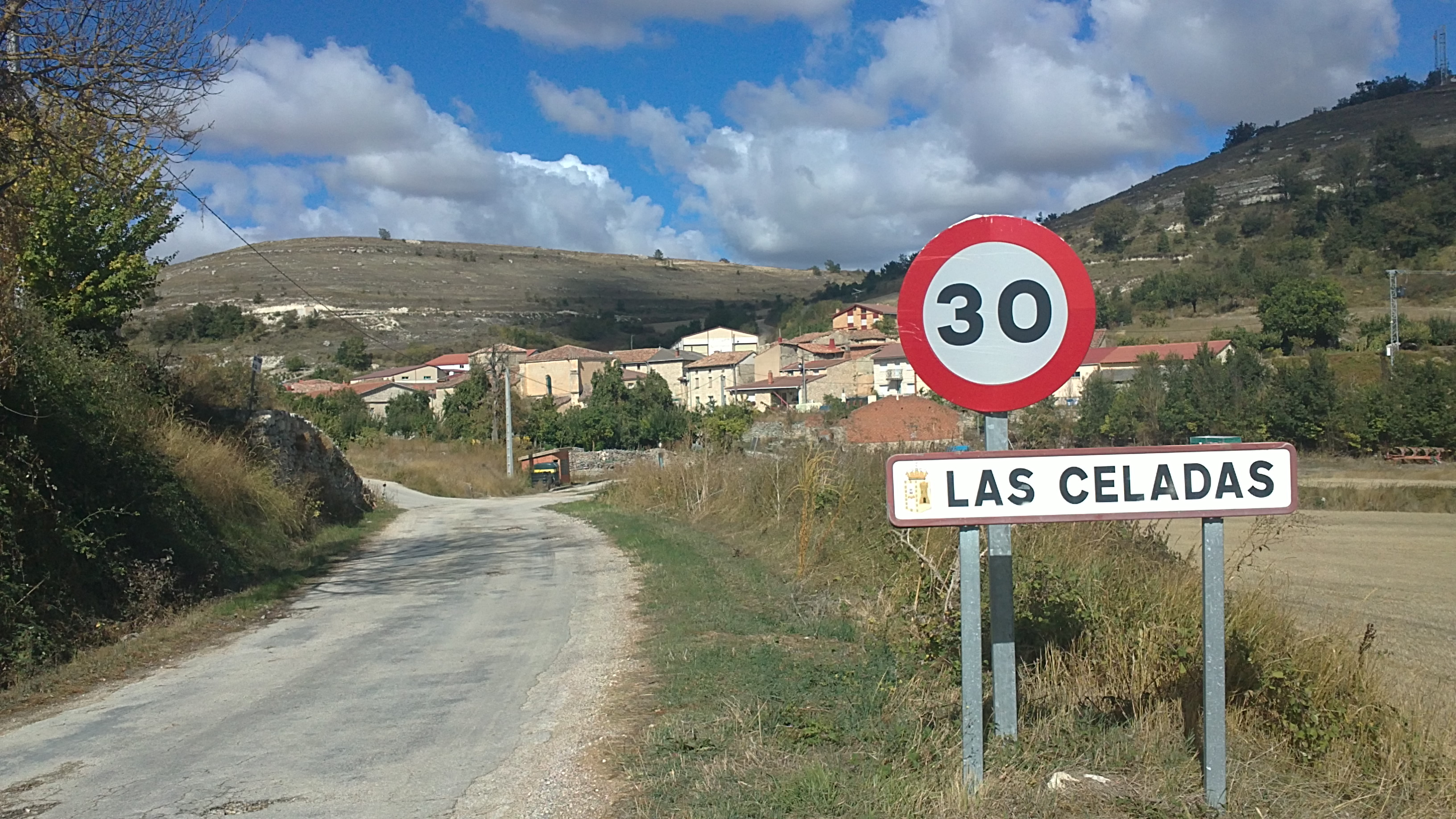 Vista desde la carretera llegando al pueblo